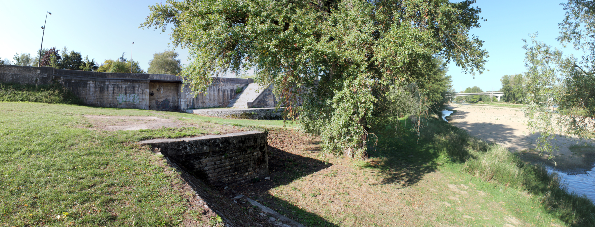 La porte nord du canal de jonction du cher à la Loire à Tours.